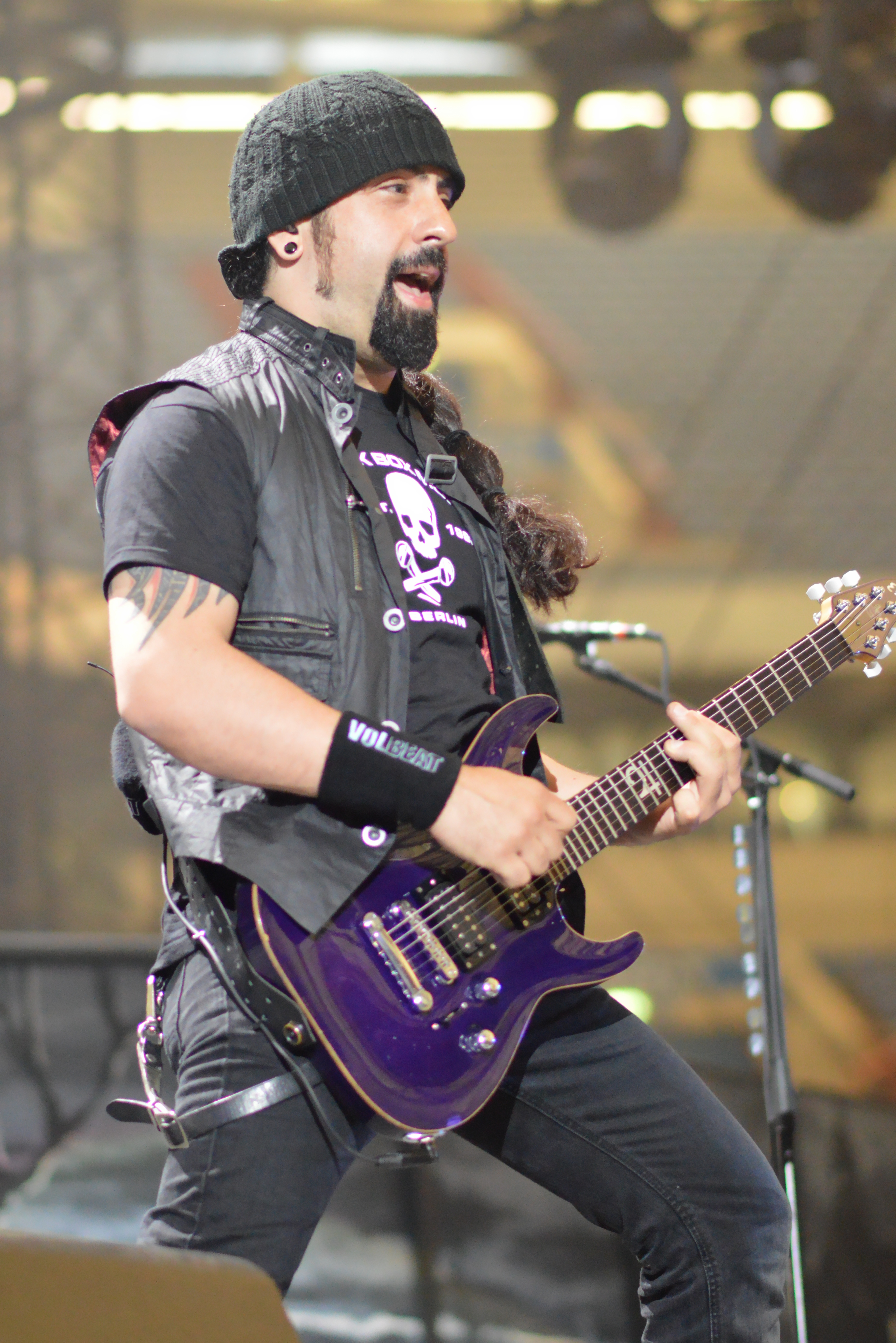 Volbeat bei Rock im Pott 2013